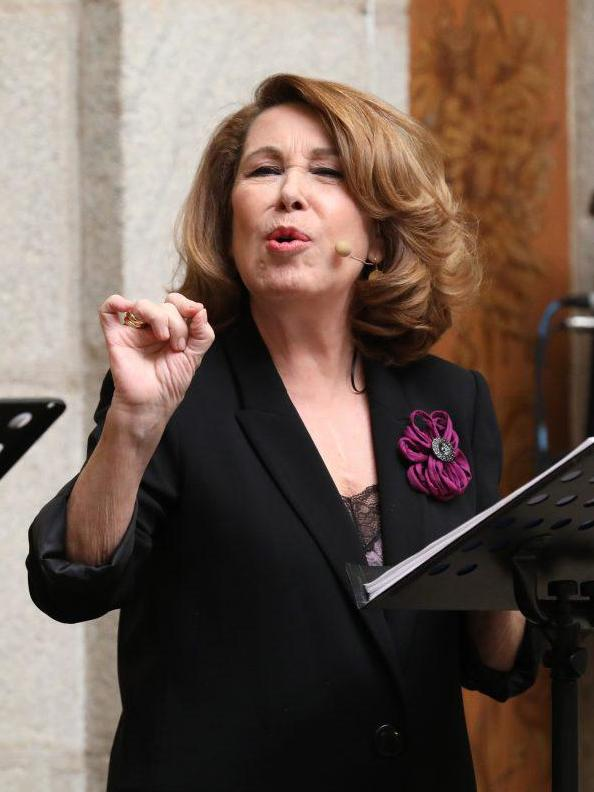 La delegada del Área de Equidad, Derechos Sociales y Empleo, Marta Higueras, ha presentado esta mañana la campaña “Madrid, con los años” en un acto celebrado en la Plaza de la Villa para conmemorar el Día Internacional de las Personas de Edad en el que se ha ofrecido un recital poético de obras escritas por mujeres.